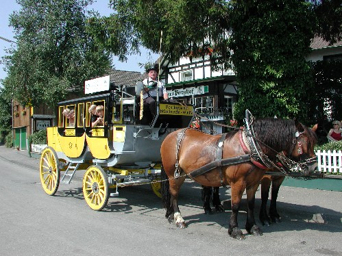 Oberbergisch stagecoach stops at the pony hotel in Hübender. The coach is a younger copy of a stagecoach from 1871. - Oberbergische Postkutsche beim Halt am Ponyhof in Hübender, Nachbau einer Kaiserlichen Postkutsche aus dem Jahr 1871. Reference: Author Hans Kadereit Time of creation 2003 Licence GNU FDL and CC-by-SA Camera Olympus C3040